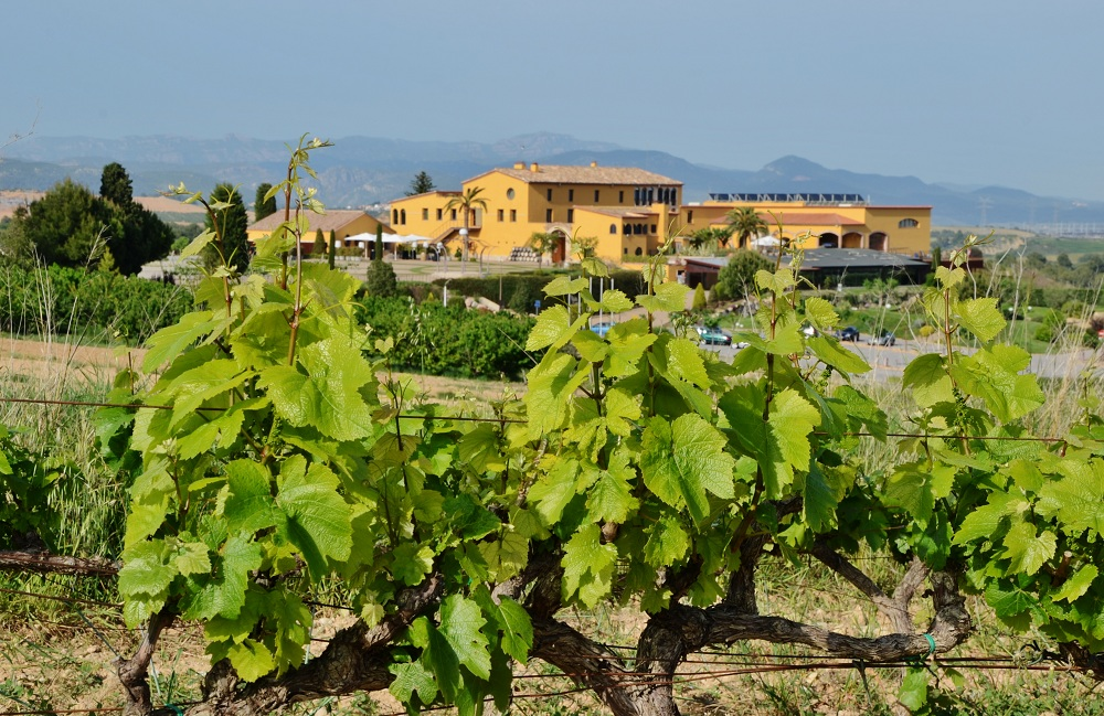 Can Bonastre de Santa Magdalena (Masquefa)